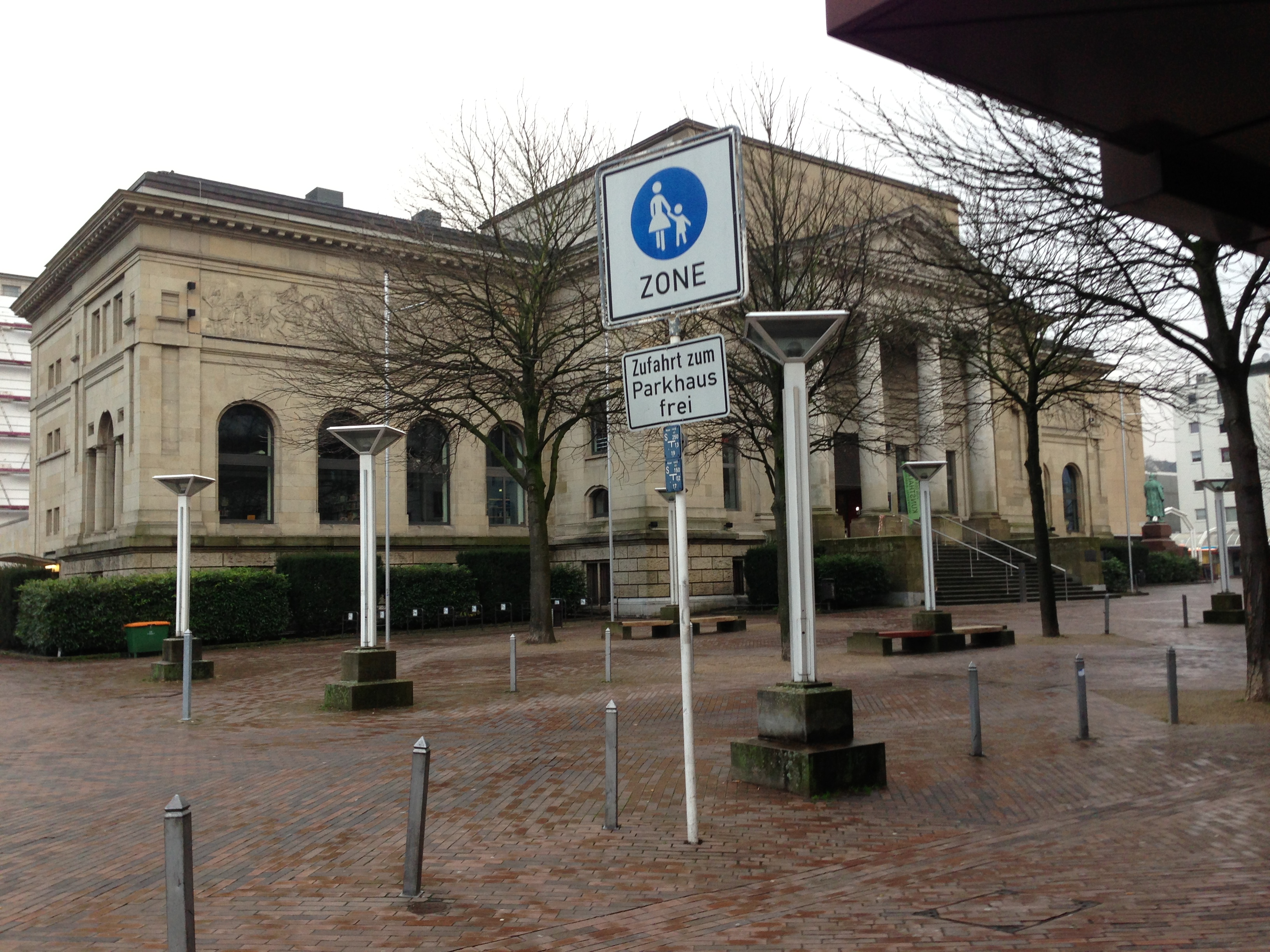 Die (nahezu) Frontansicht der Barmer Ruhmeshalle (Wuppertal).